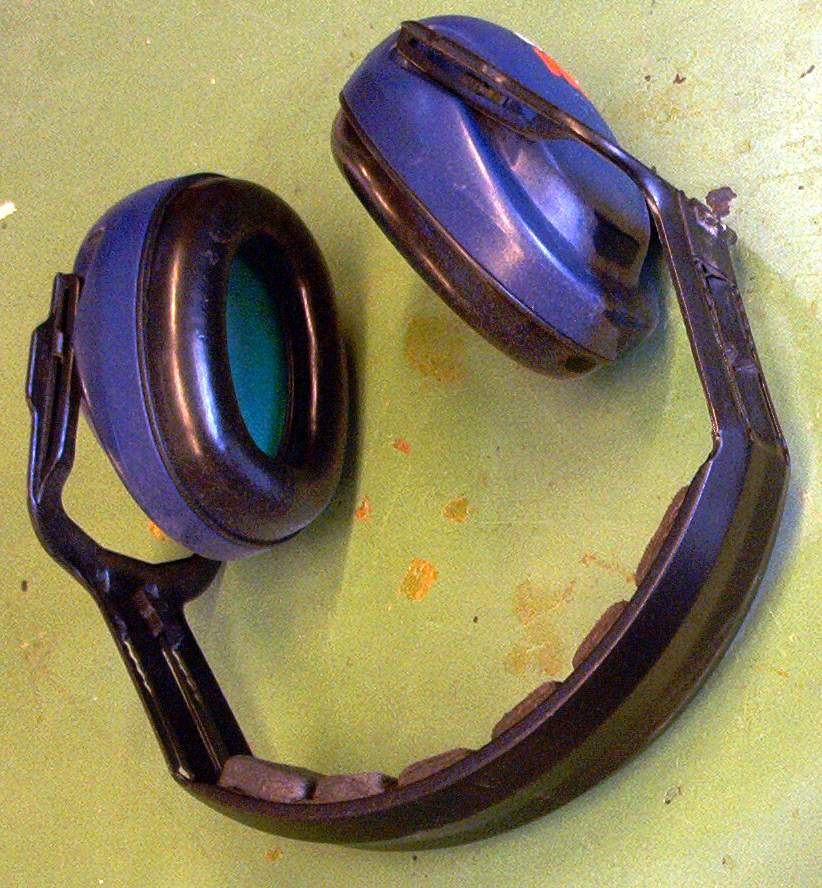 zelf gemaakte foto voor het publiek domein. Martink.